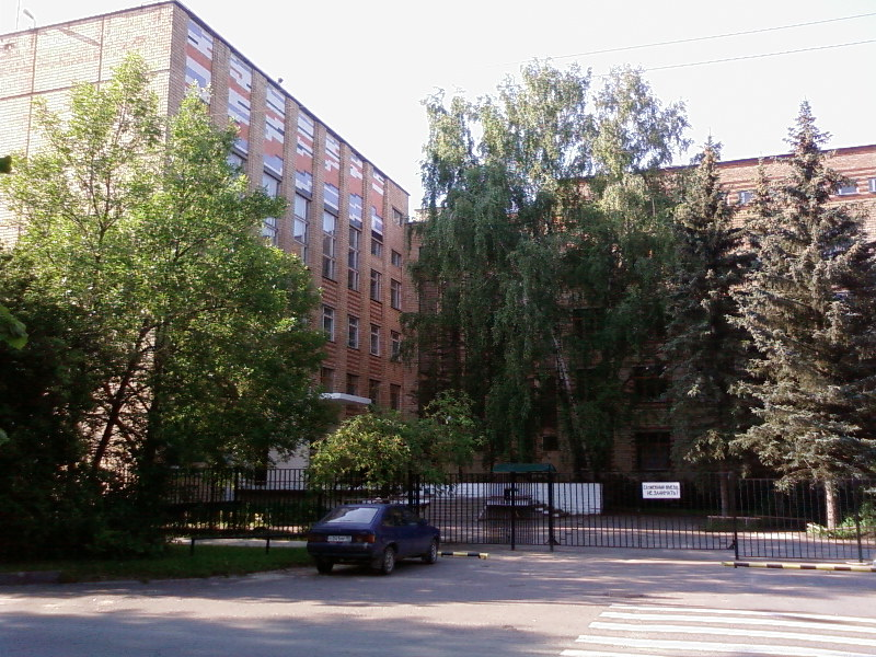 ИБК РАН